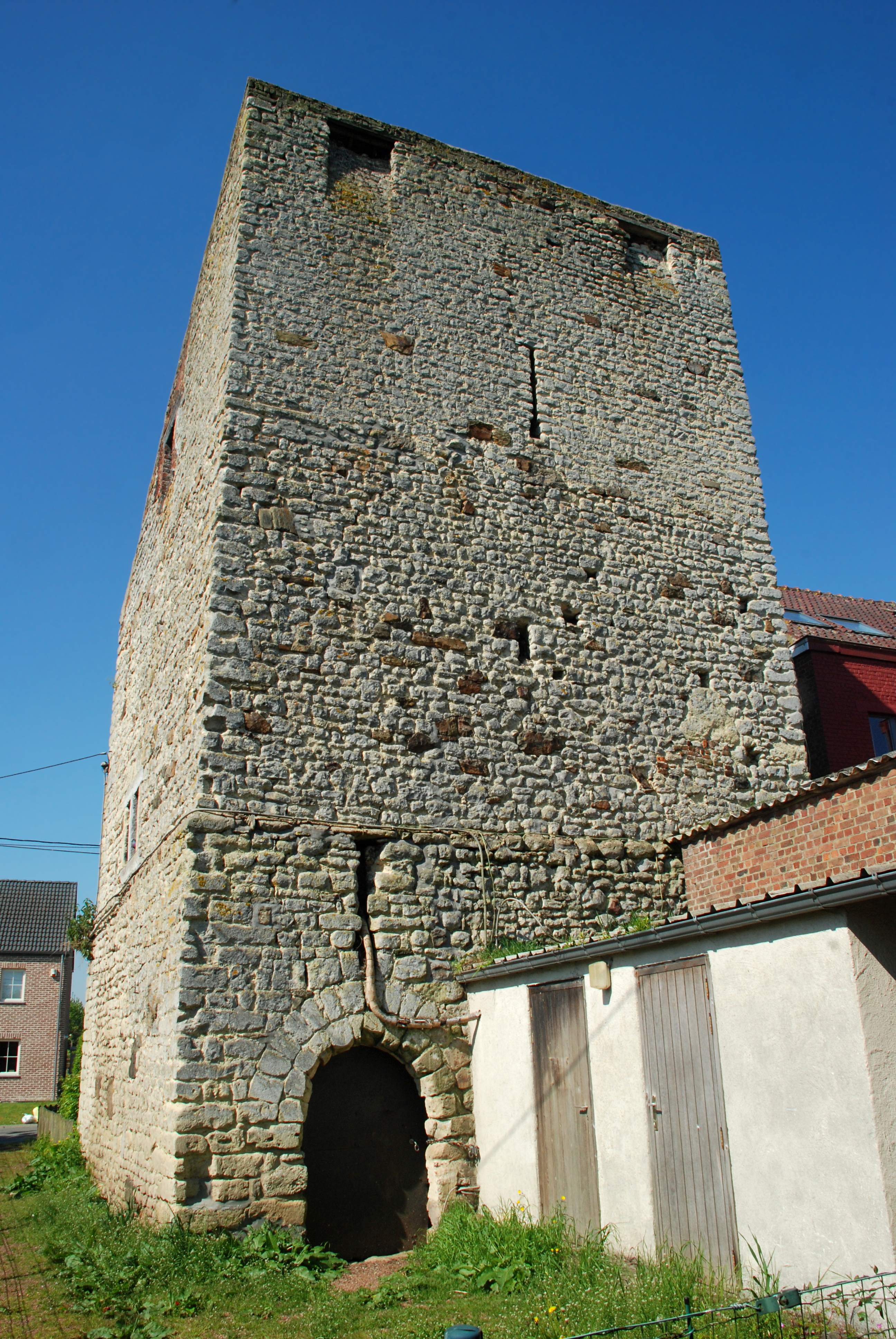 Belgique - Brabant wallon - Mont-Saint-Guibert - Corbais - Tour Griffon du Bois (donjon de Corbais, 13e siècle)